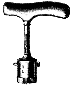 Trepan Stilles model